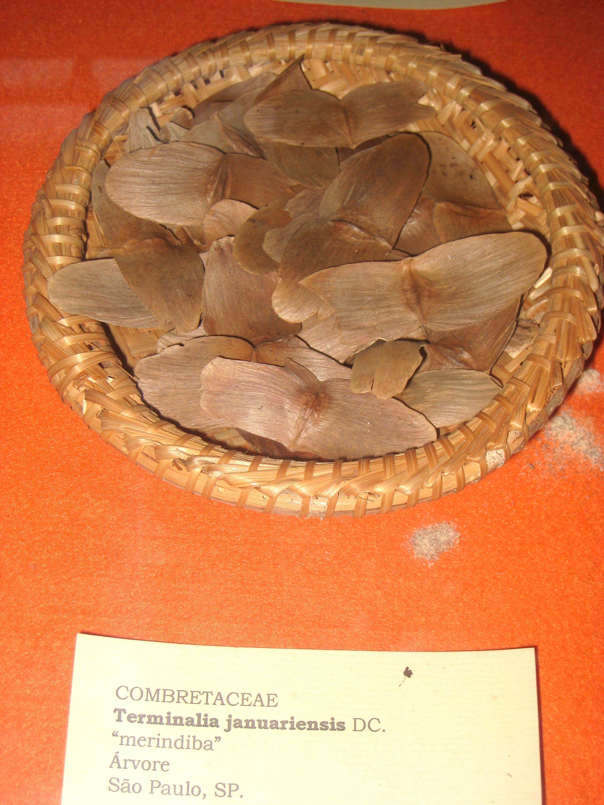 Terminalia januariensis specimen in the Museu Botânico Dr. João Barbosa Rodrigues, Jardim Botânico de São Paulo, São Paulo City, SP, Brazil.